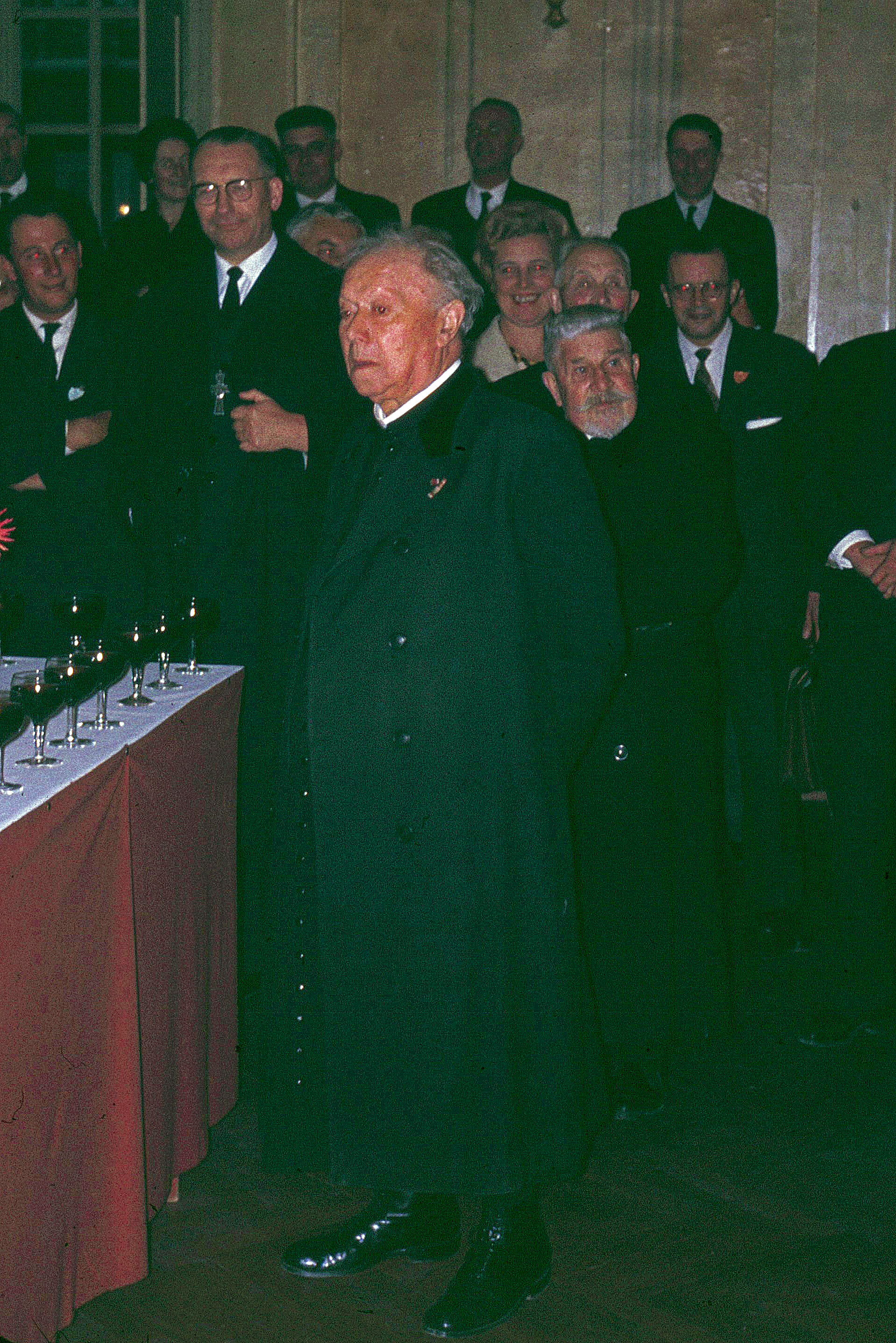 Photographie de Lucien Thimonier